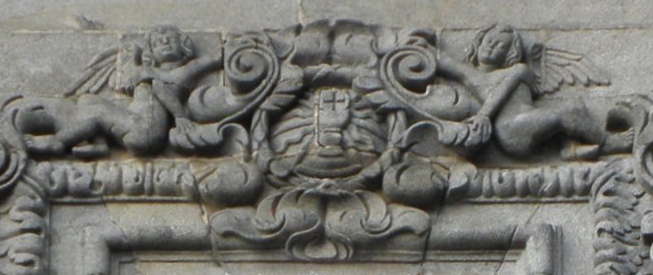 Armas de Galiza no antigo Hospital Real de Santiago de Compostela.